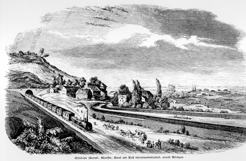 Eisenbahn (Tunnel), Chaussee, Canal und Fluß nebeneinanderlaufend, unweit Erlangen. Lithographie von Nicholls und Allanson, Stadtarchiv Erlangen